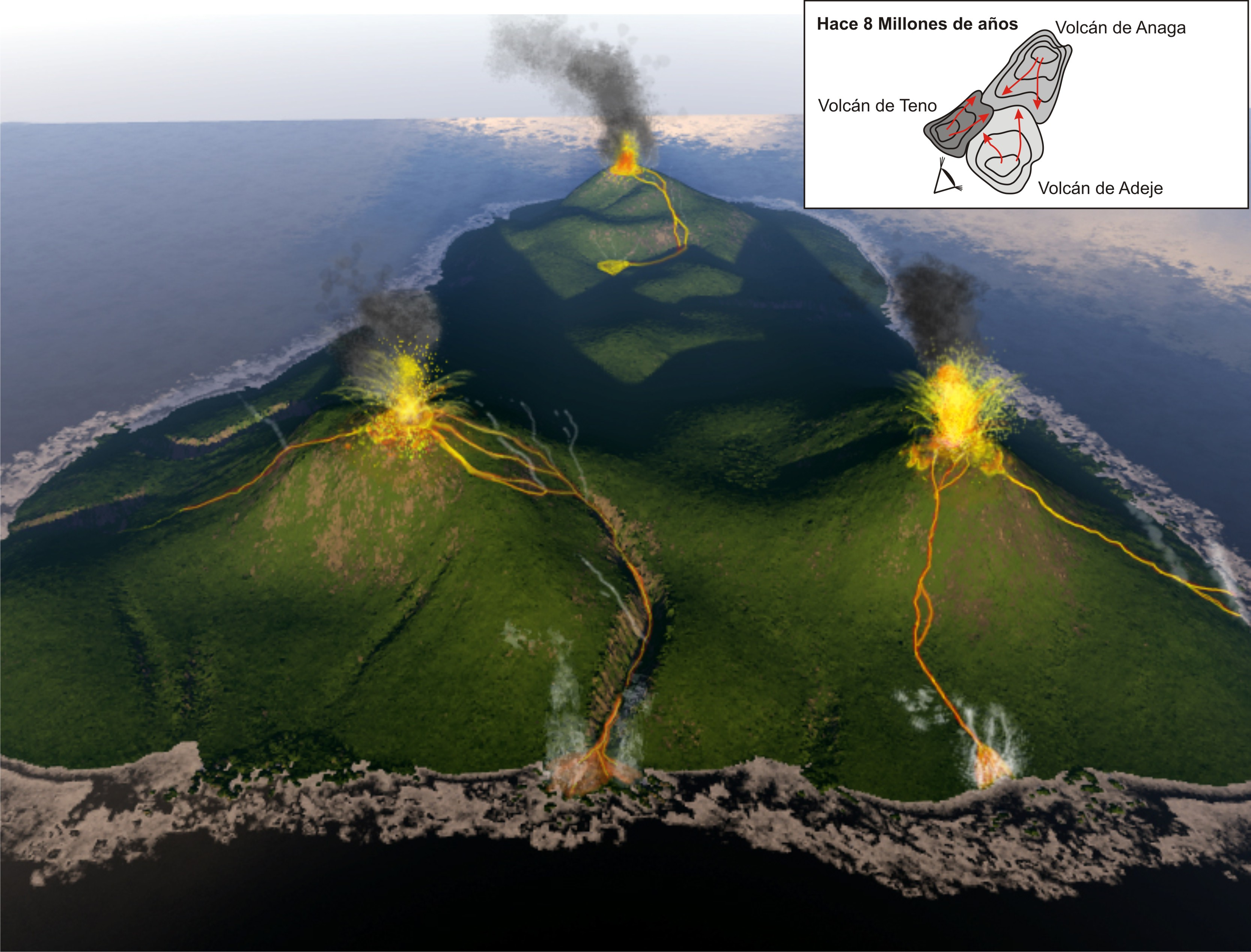 Frühphase bei der Entstehung der Insel Tenerifa